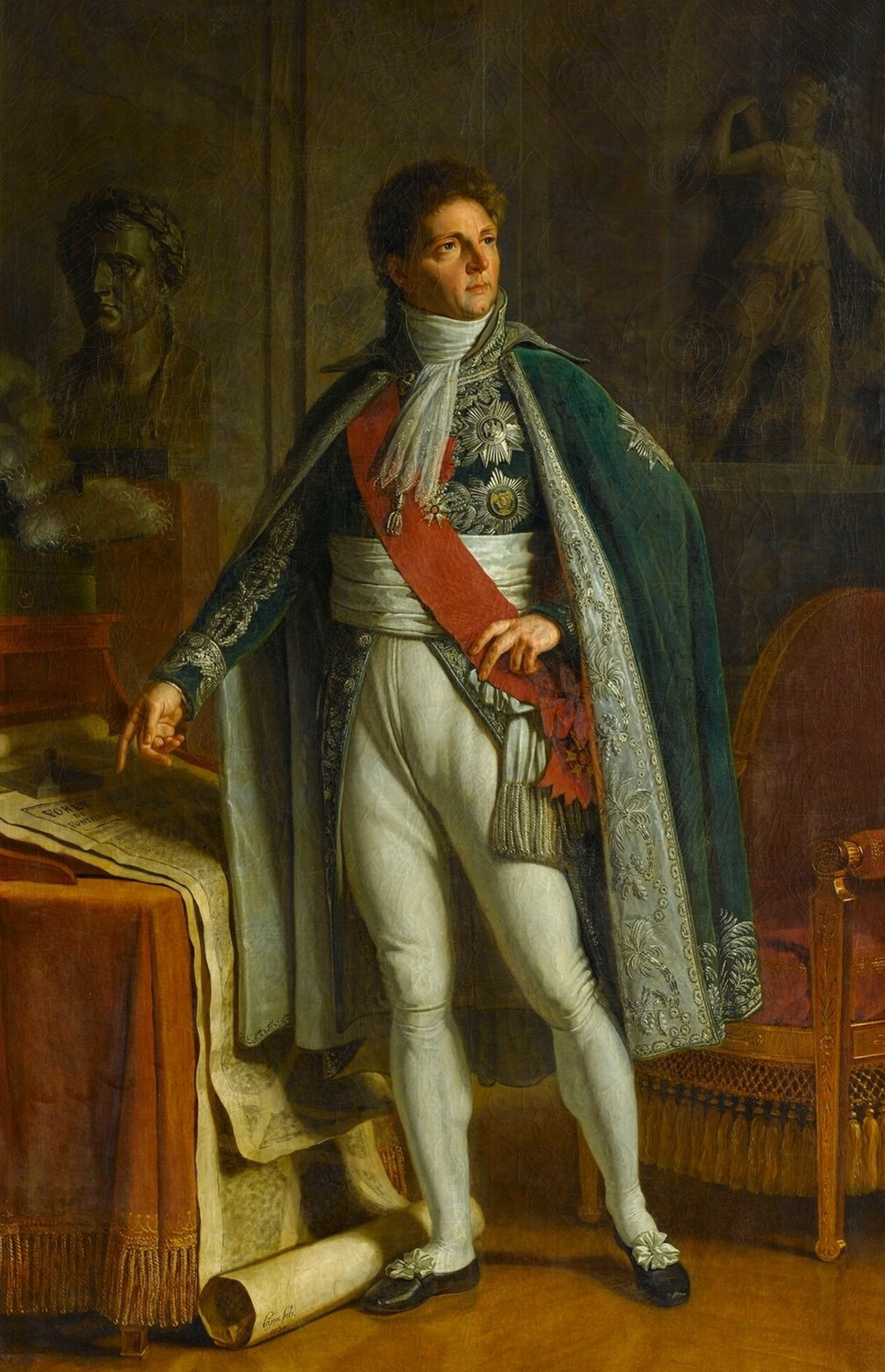 d'après un original exposé au Salon de 1804; commandé par Napoléon Ier pour la salle des maréchaux du palais des Tuileries à Paris en 1804